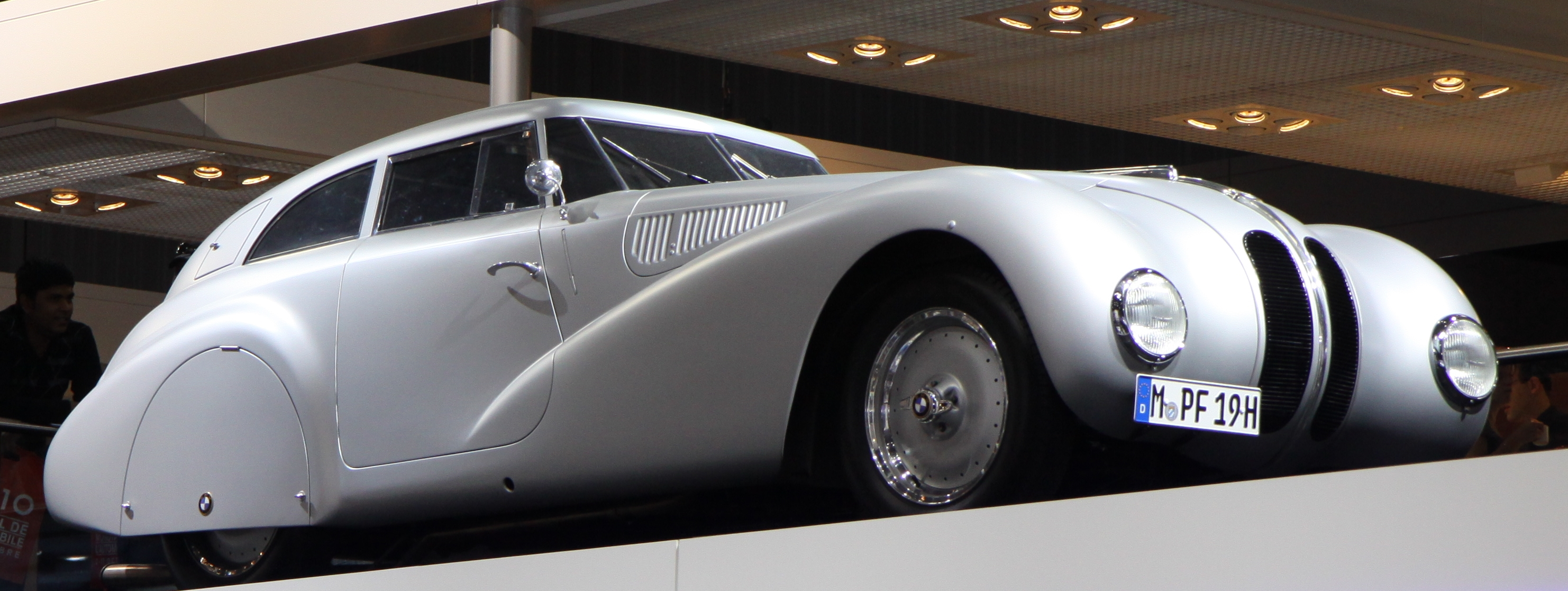 Paris - Mondial de l'automobile 2010